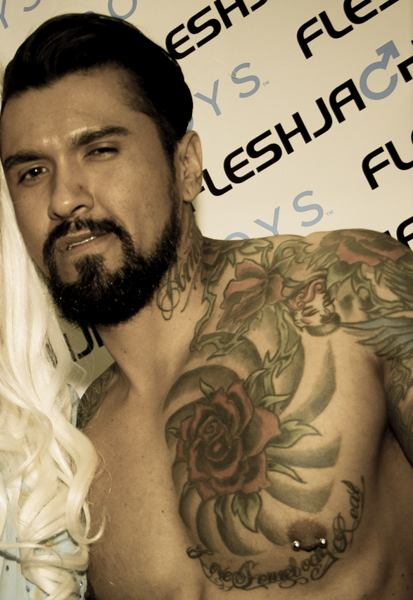 Rupaul's Dragcon 2017